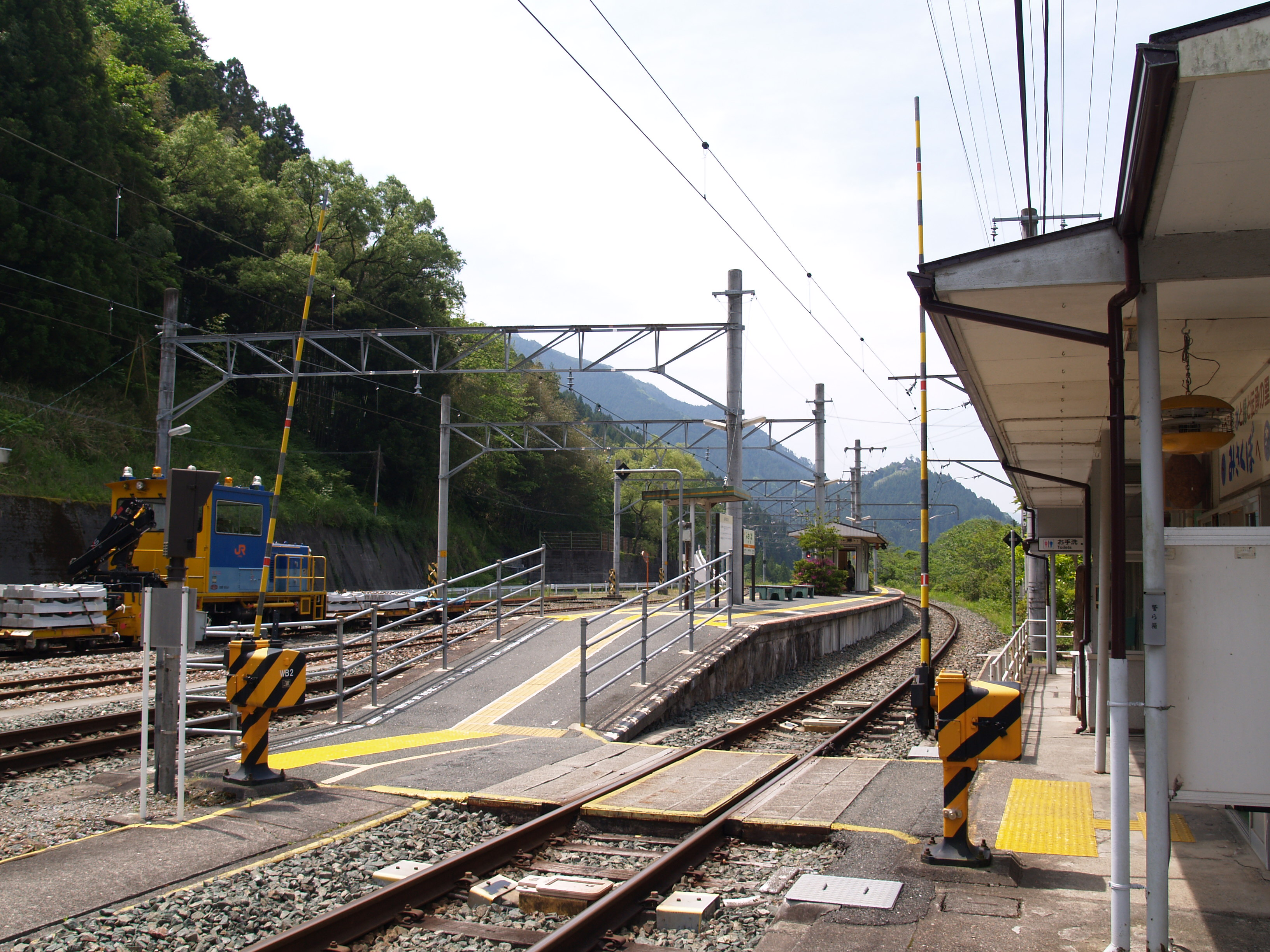 水窪駅ホーム